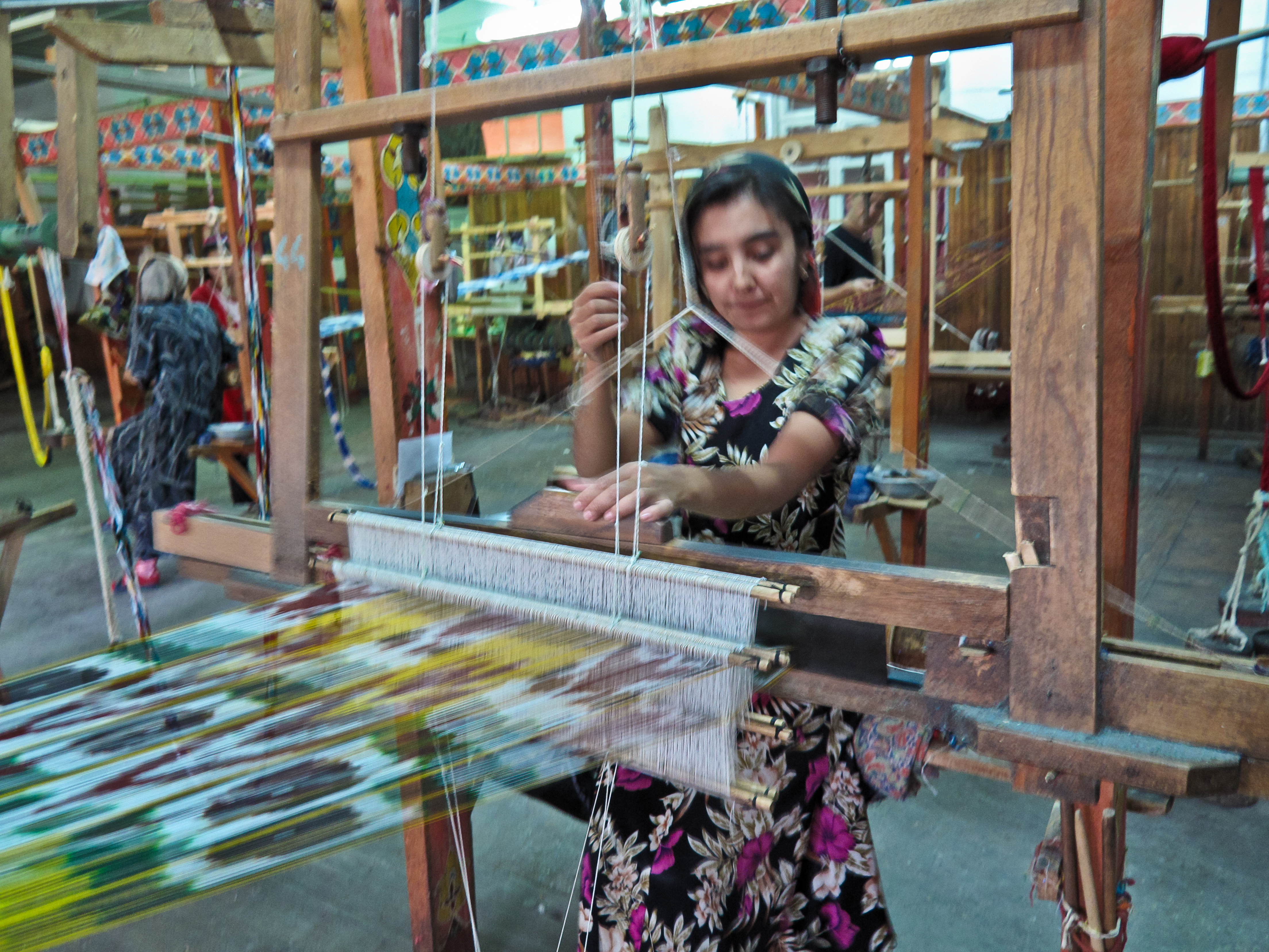 in Margilan, Uzbekistan